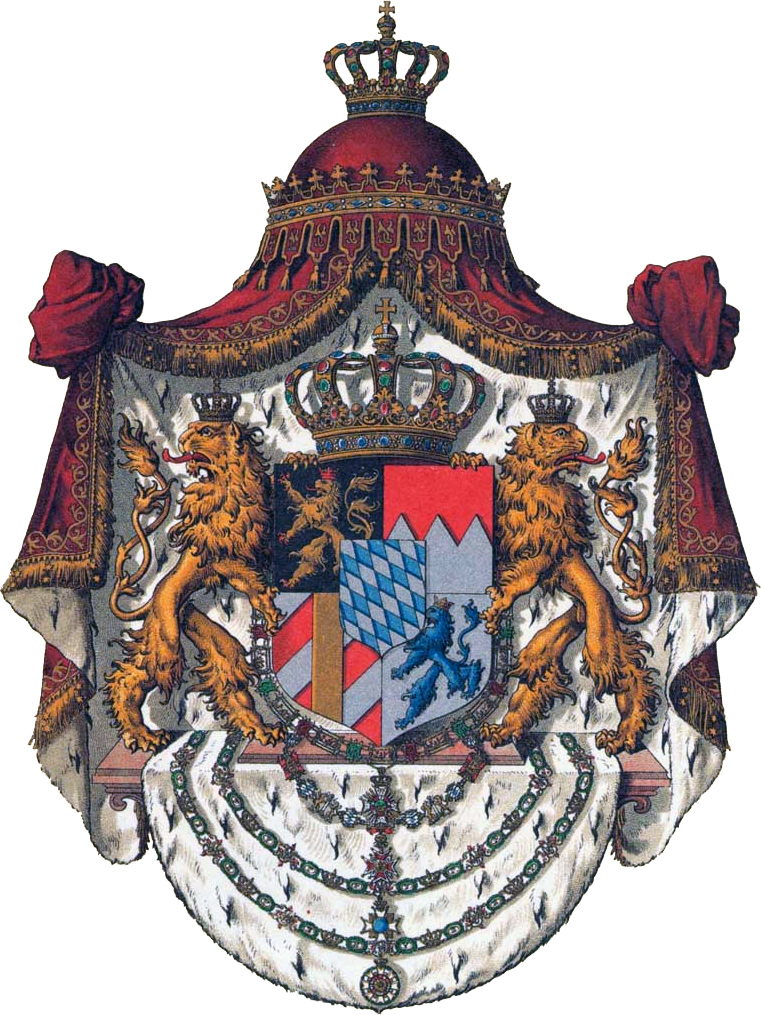 Großes Wappen des Königreichs Bayern